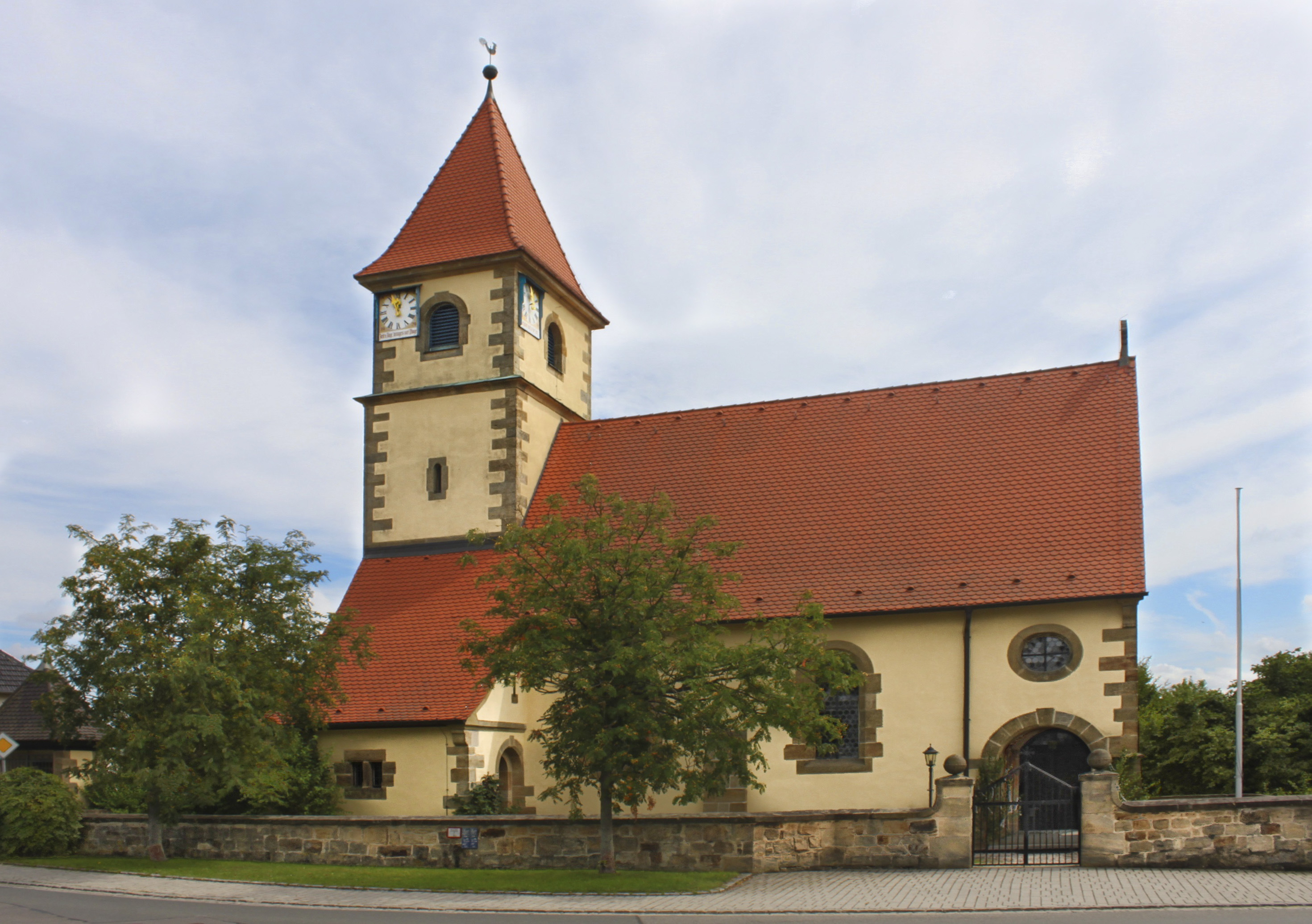 Die evangelisch-lutherische Pfarrkirche, Rathausstraße 1, im Michelauer Ortsteil Schwürbitz, Baudenkmal D-4-78-145-64